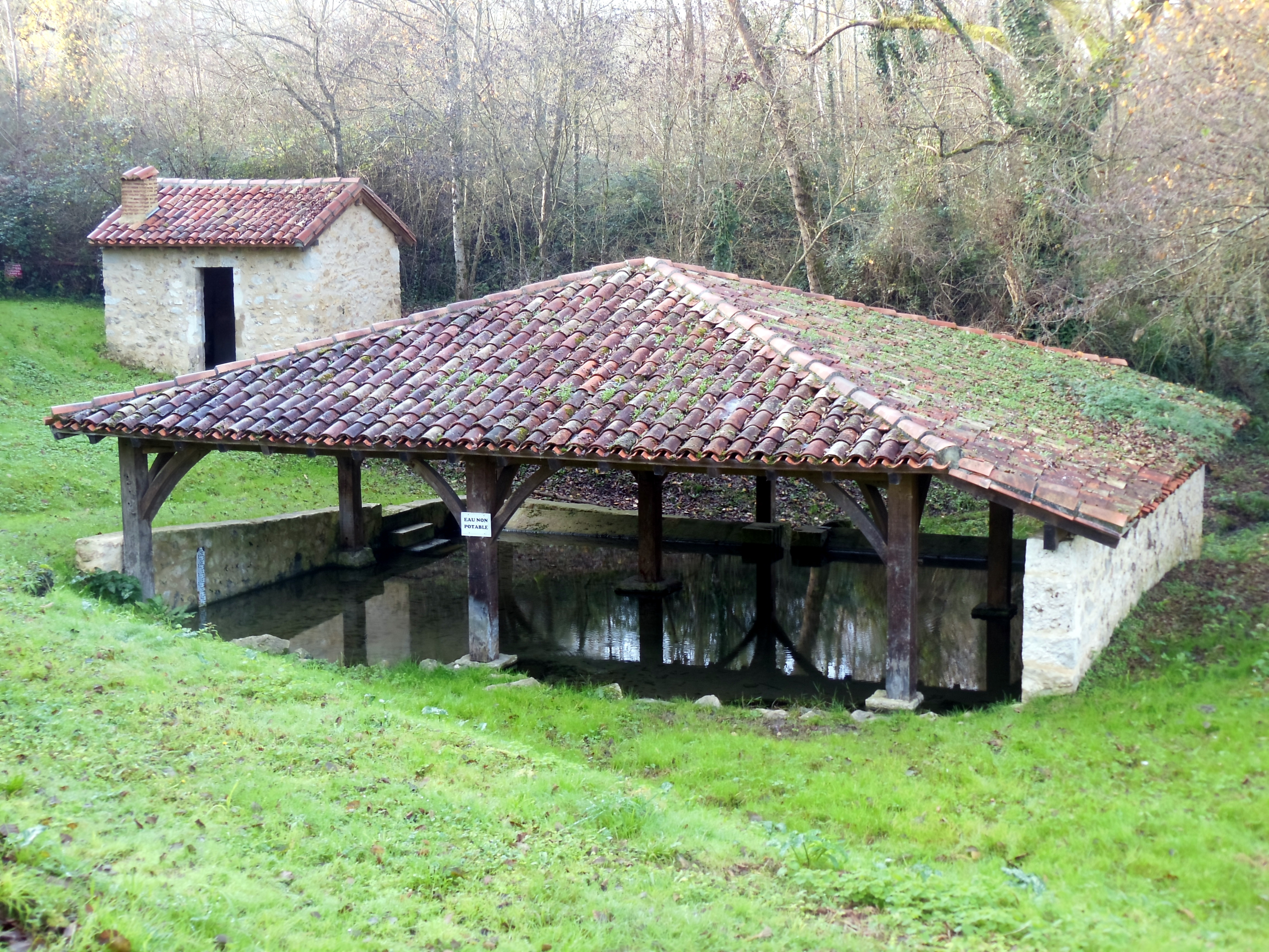 Fontaine ou lavoir Saint-Vincent (Landes, France)